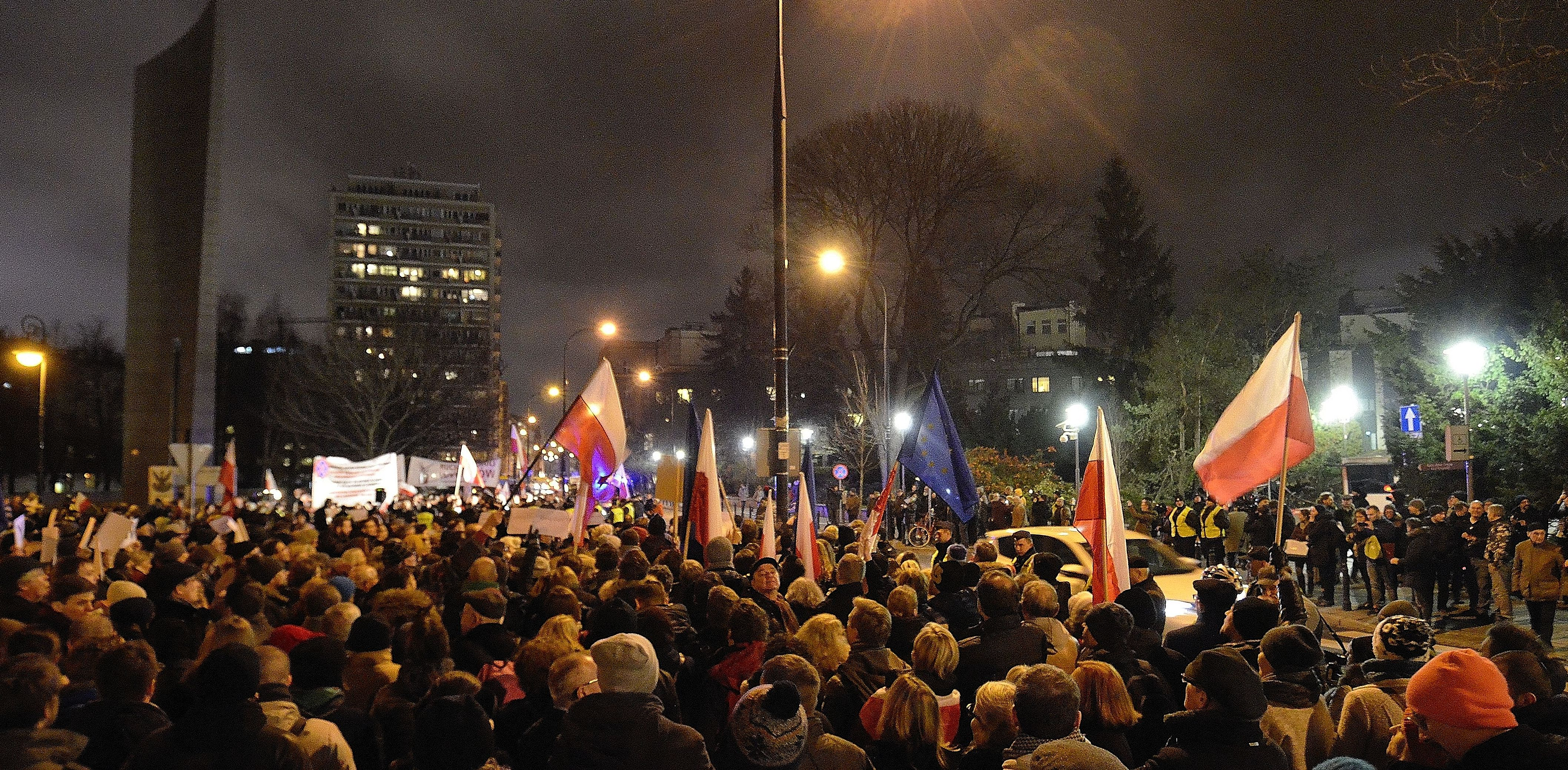 Demonstracje na ulicy Wiejskiej podczas 3. posiedzenia Sejmu, na których wybrano Henryka Ciocha, Lecha Morawskiego, Mariusza Muszyńskiego, Piotra Pszczółkowskiego i Julię Przyłębską na sędziów Trybunału Konstytucyjnego